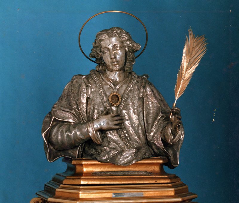 Il busto in argento si trova nella Chiesa patronale di San Quintino ad Alliste (Italia). Fu eseguito nel 1715 dall'argenteiere napoletano Domenico De Blasio